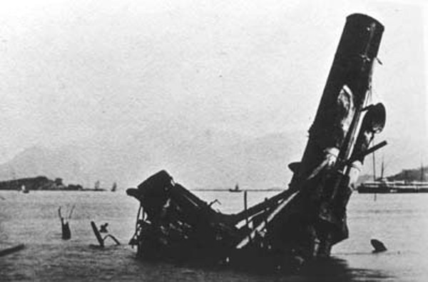 Sunken warship Yangwu